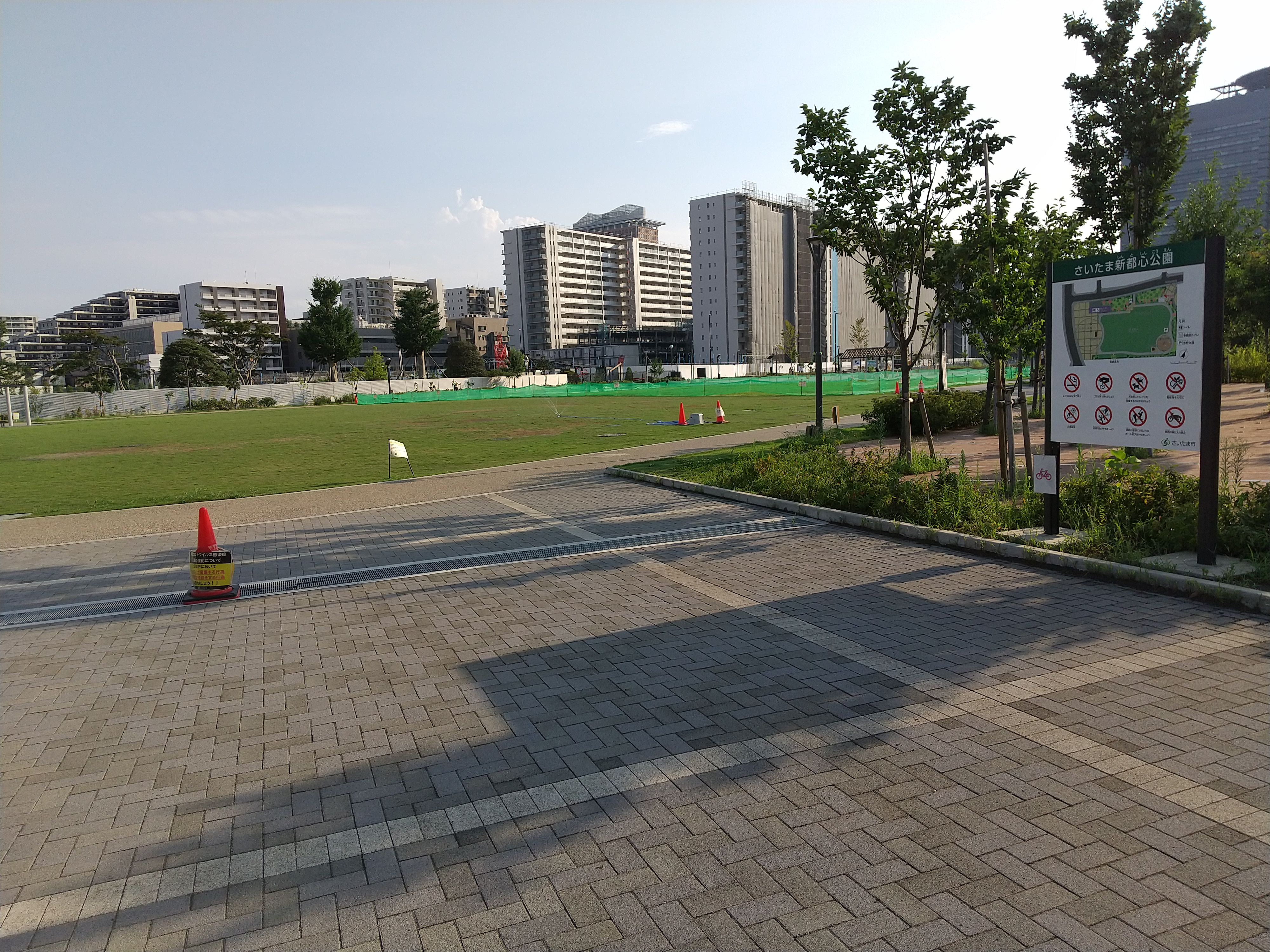 2020年8月撮影 さいたま新都心公園